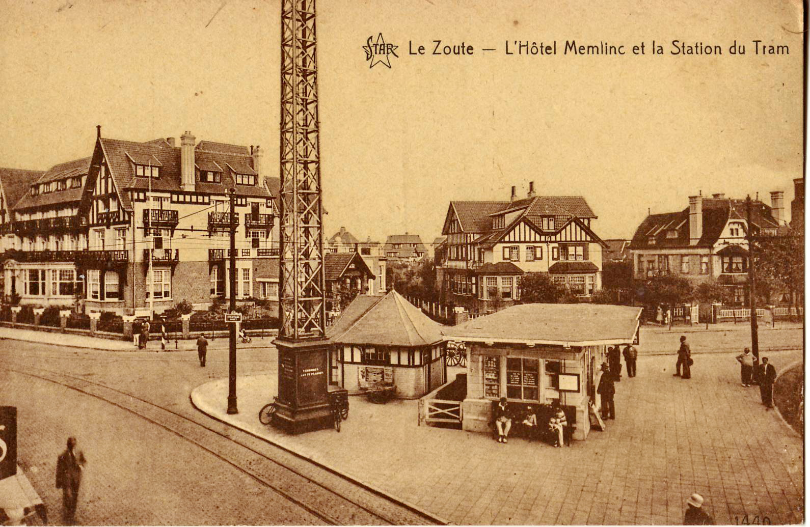 Carte postale ancienne éditée par STAR (De Graeve Gand) n°1440 : LE ZOUTE - L'Hôtel Memlinc et la Station du Tram